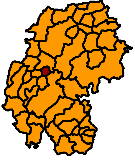 Neusiß hervorgehoben, Ilm-Kreis